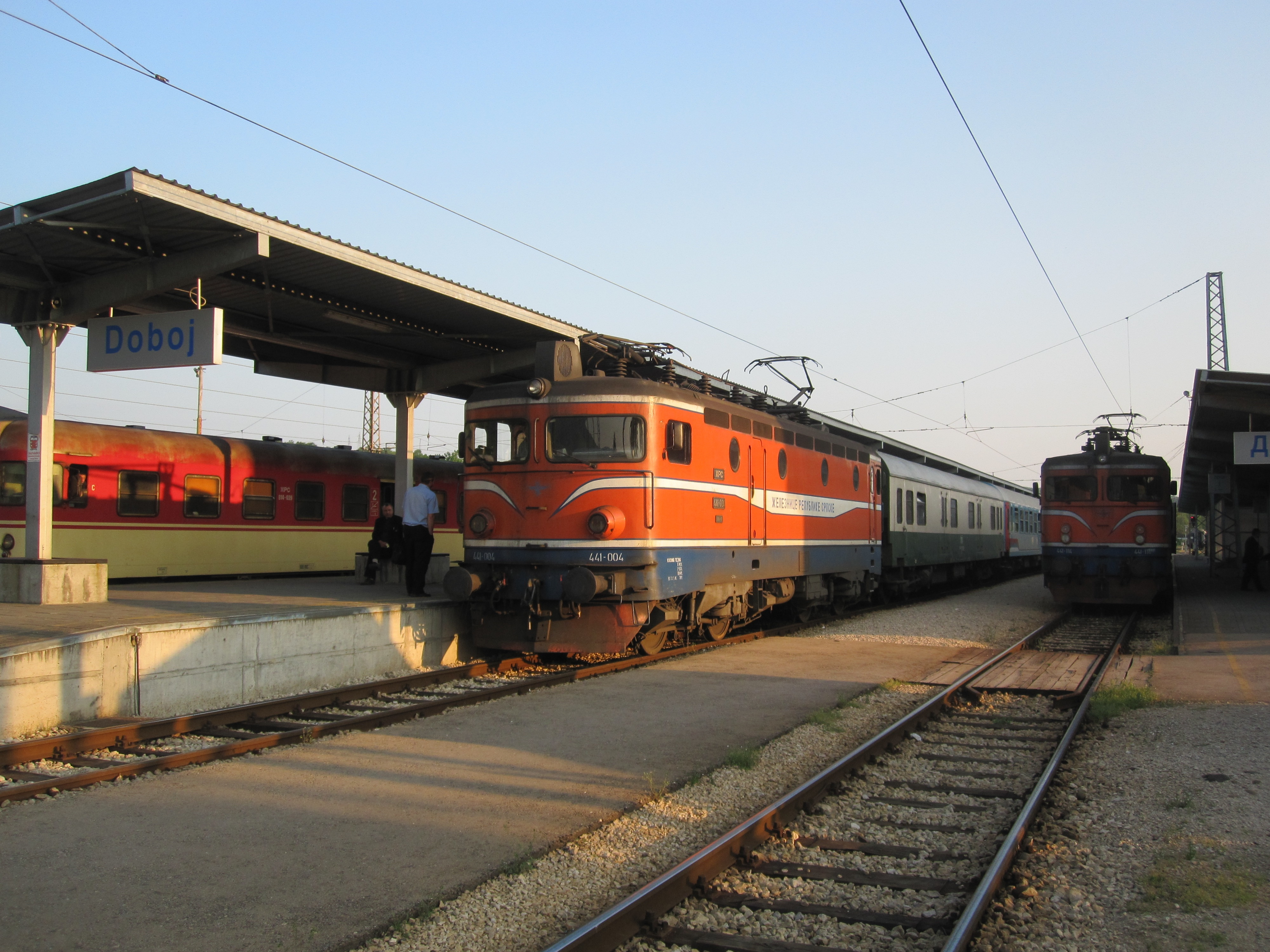 13.05.11 Doboj ŽRS 441.004